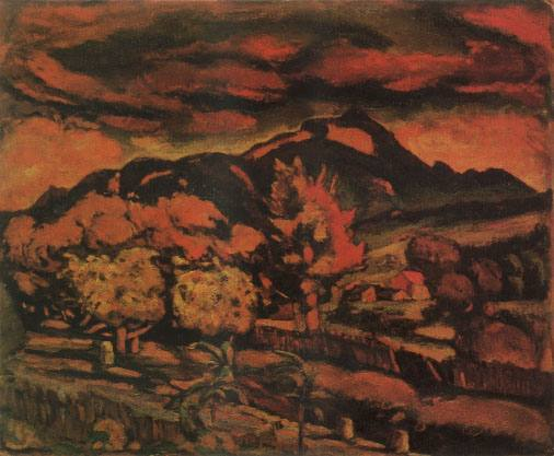 Lazar Drljaca, Trebevic nuageux, 1939, huile sur carton, 50,5 x 60 cm